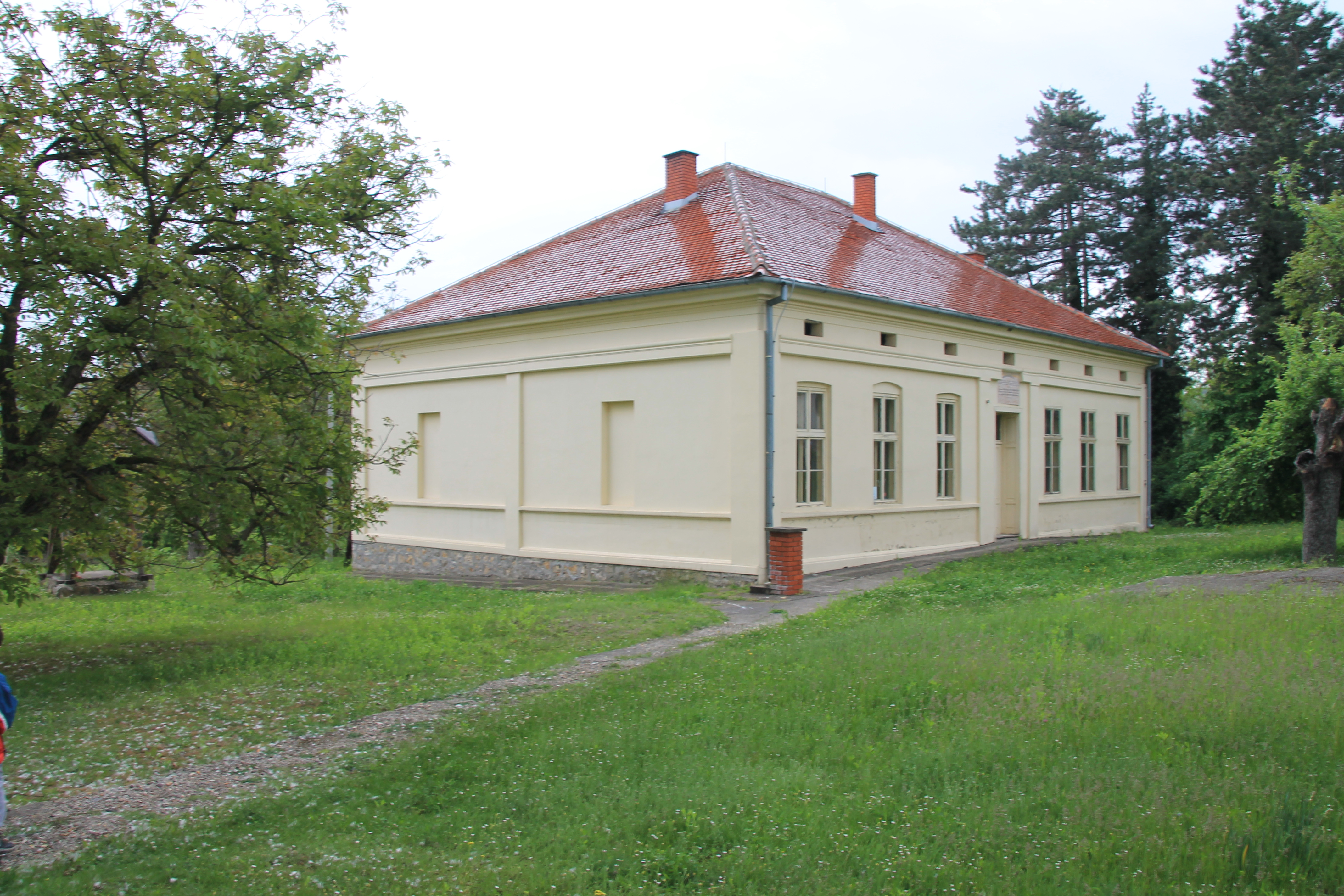 Zgrada seoske škole